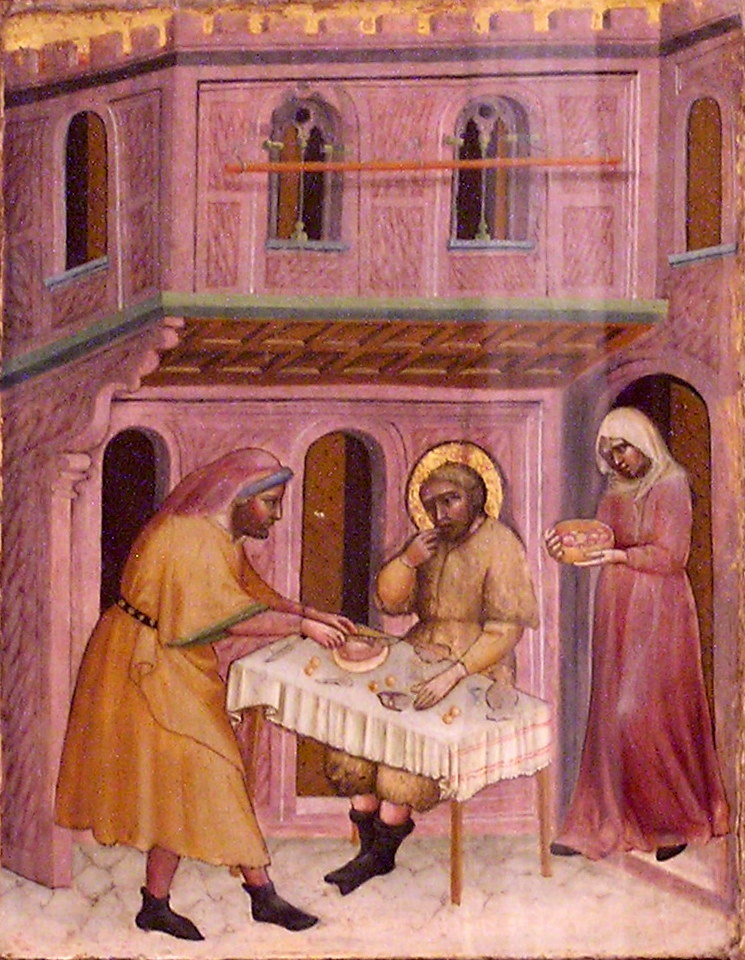 Sono io l'autore della foto. Rappresenta una tempera su tavola di Olivuccio di Ciccarello conservata nella Pinacoteca Vaticana. Fa parte della serie delle Opere di misericordia ed è intitolata: "Dare da mangiare agli affamati". Era precedentemente attribuita a Carlo da Camerino. La foto non è purtroppo di buona qualità. Se ne avete una migliore sostituitela (nella Pinacoteca Vaticana è consentito fotografare le opere esposte).--Gep (msg) 18:23, 18 feb 2012 (CET)